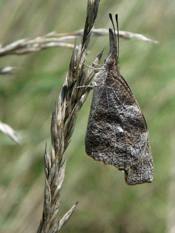 Libytheana carinenta